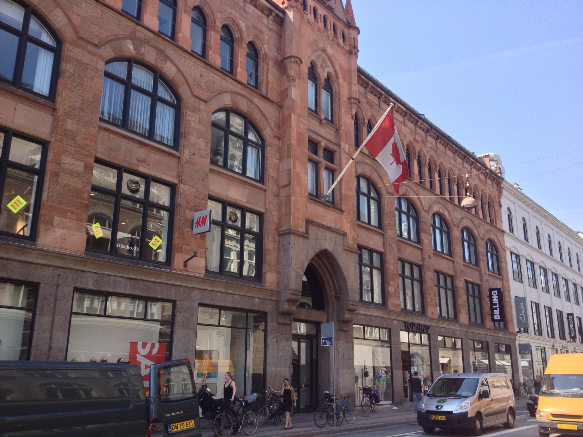 Embassy of Copenhagen in Copenhagen, Denmark